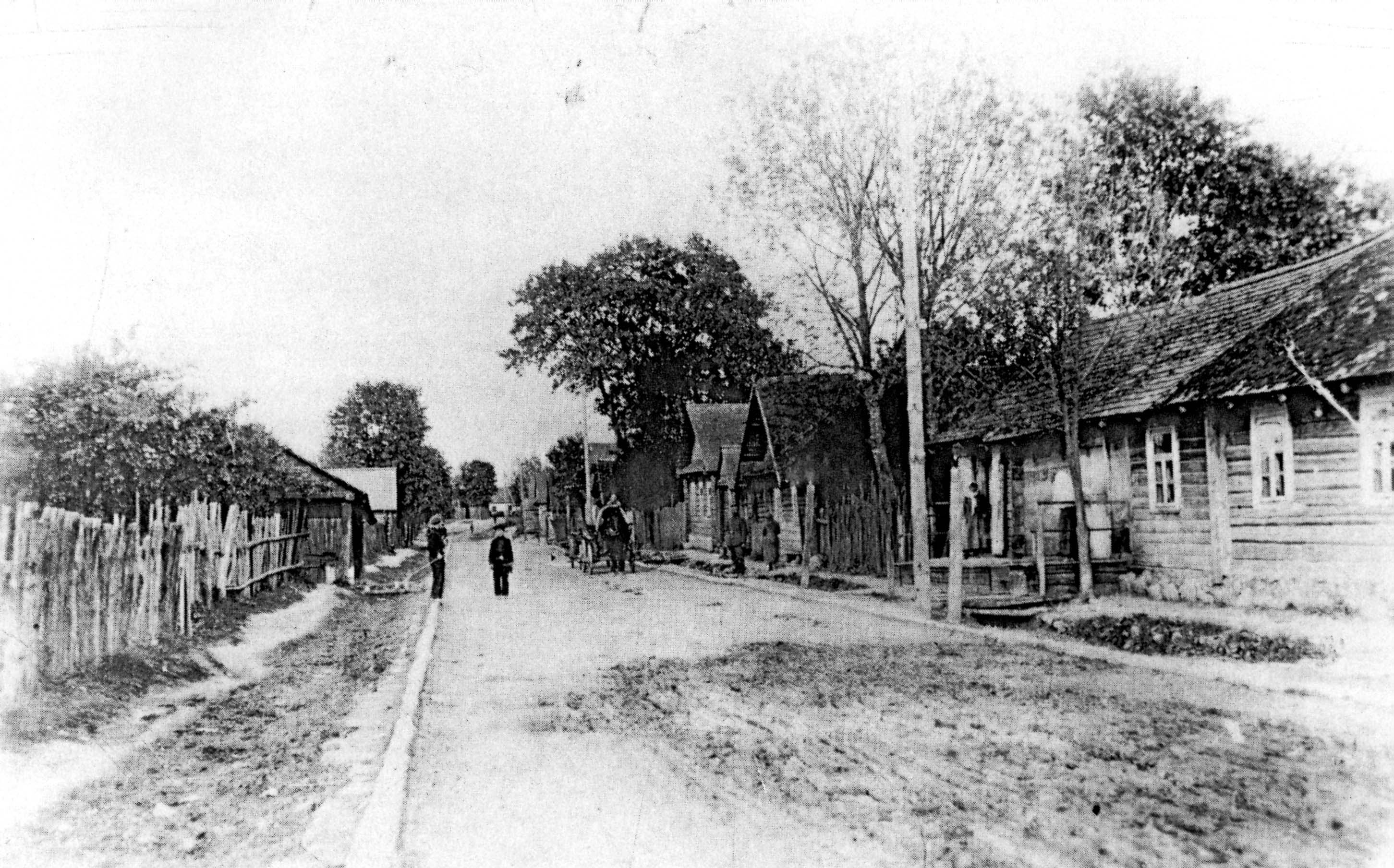 Беларуская (тарашкевіца): Грозаў (Hrozaŭ), неідэнтыфікаваная вуліца